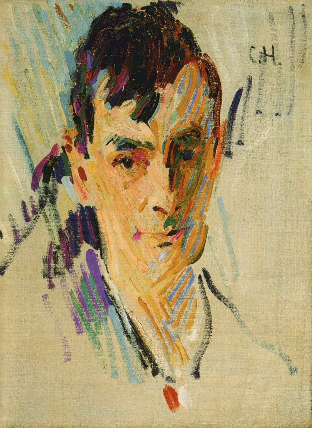 Bildnis des Malers Otto Mueller